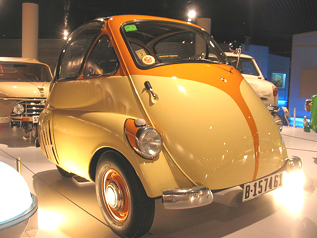 Fotografía digital realizada por Pablo Alberto Salguero Quiles